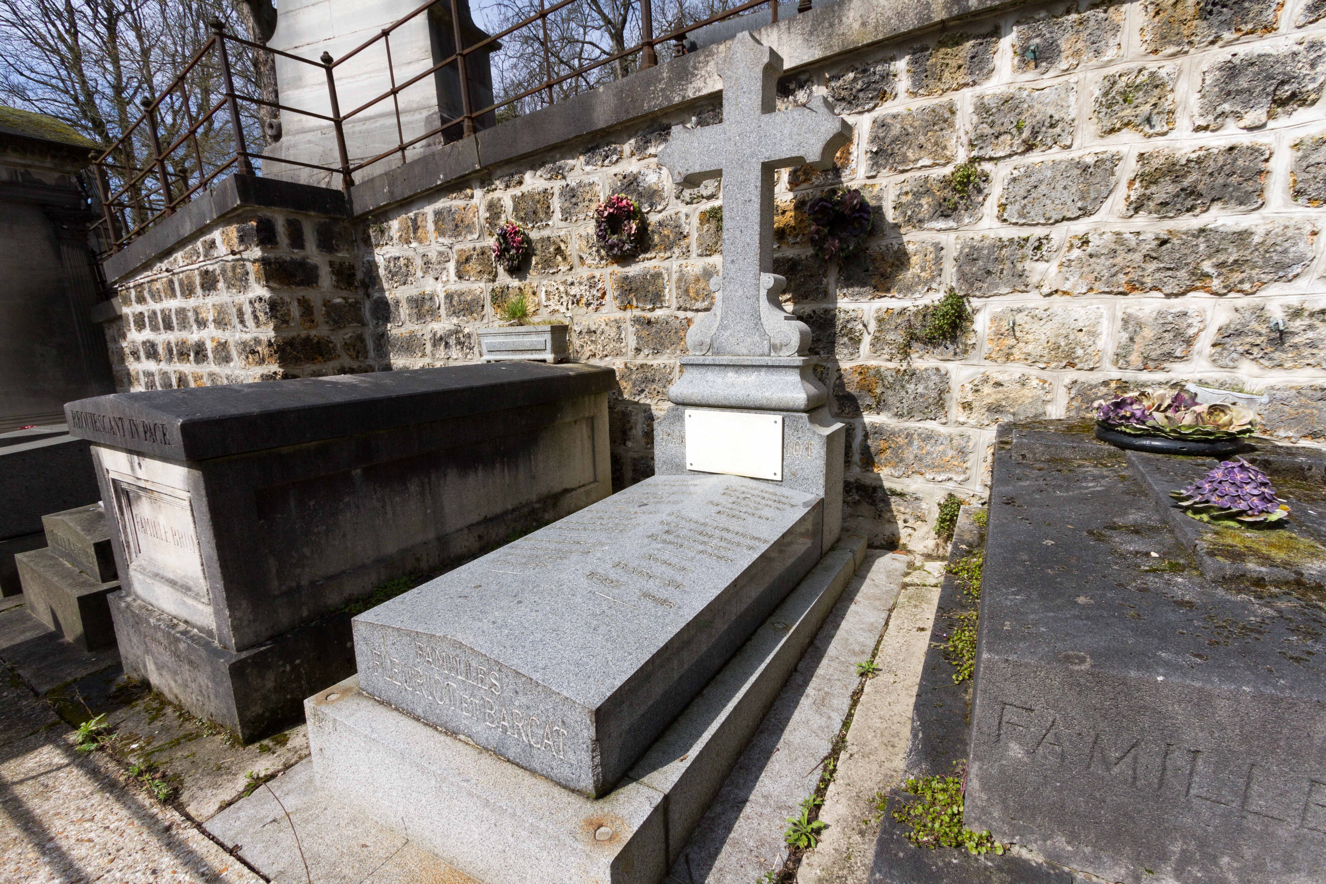 Sépulture d'André Barcat (1896-1918), sous-lieutenant aviateur tué en combat aérien le 17 juillet 1918.